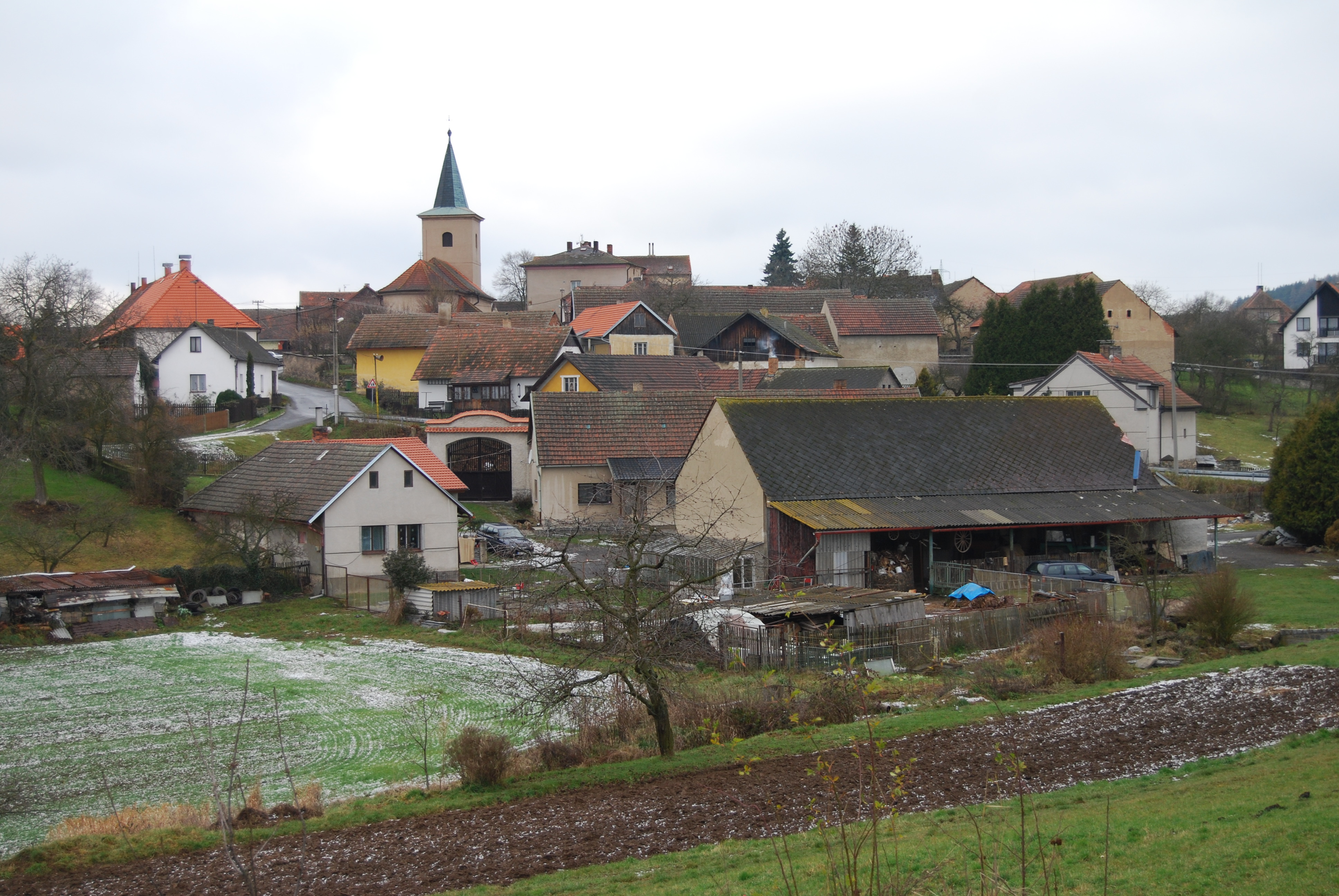 Celkový pohled na obec. Obec Pečice se nachází v okrese Příbram, kraj Středočeský. Česká republika. - OpenStreetMap (Info)